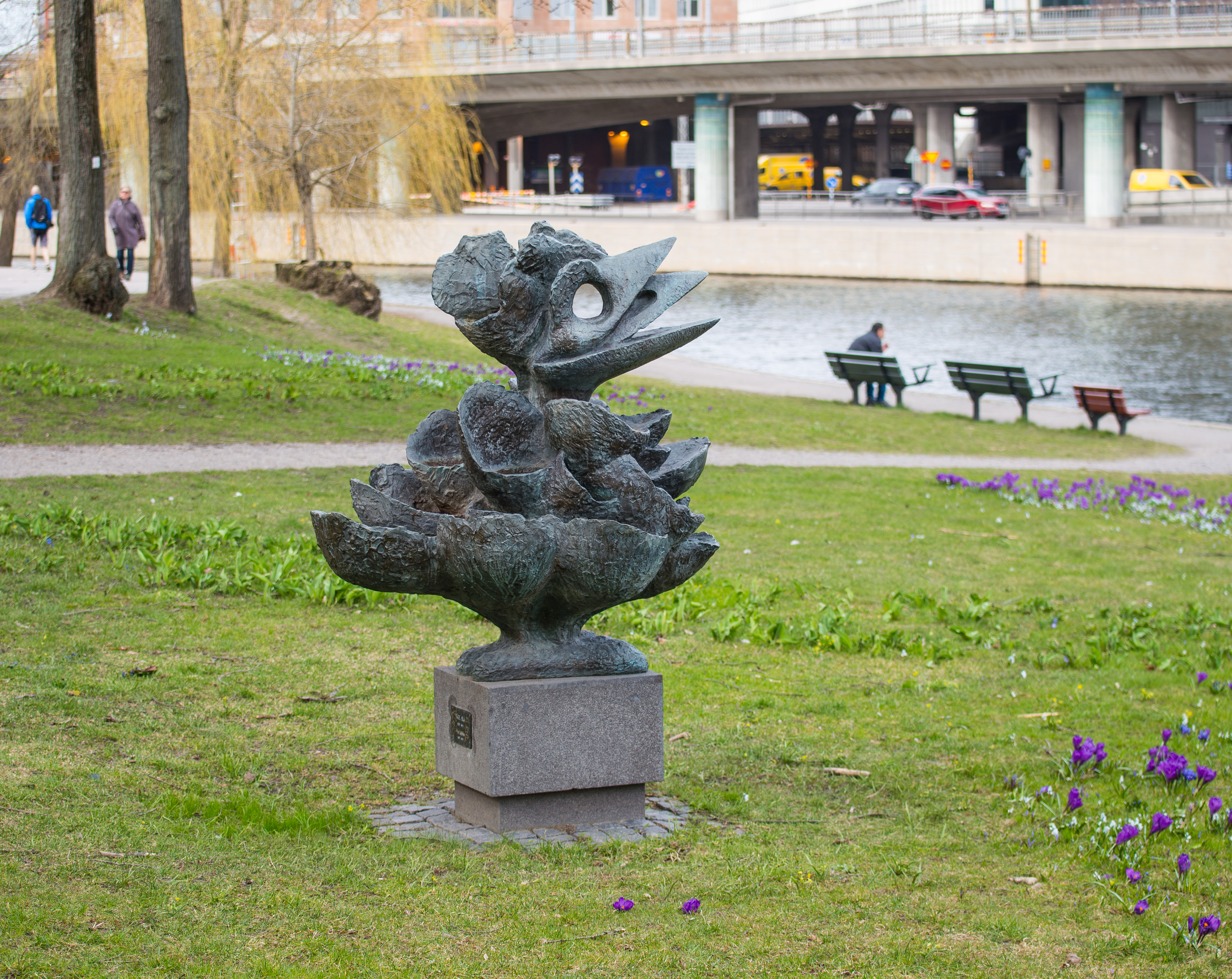 Tyra Lundgrens skulptur "Fågel blå" i Serafimerparken mittemot Stockholms stadshus i april 2015.